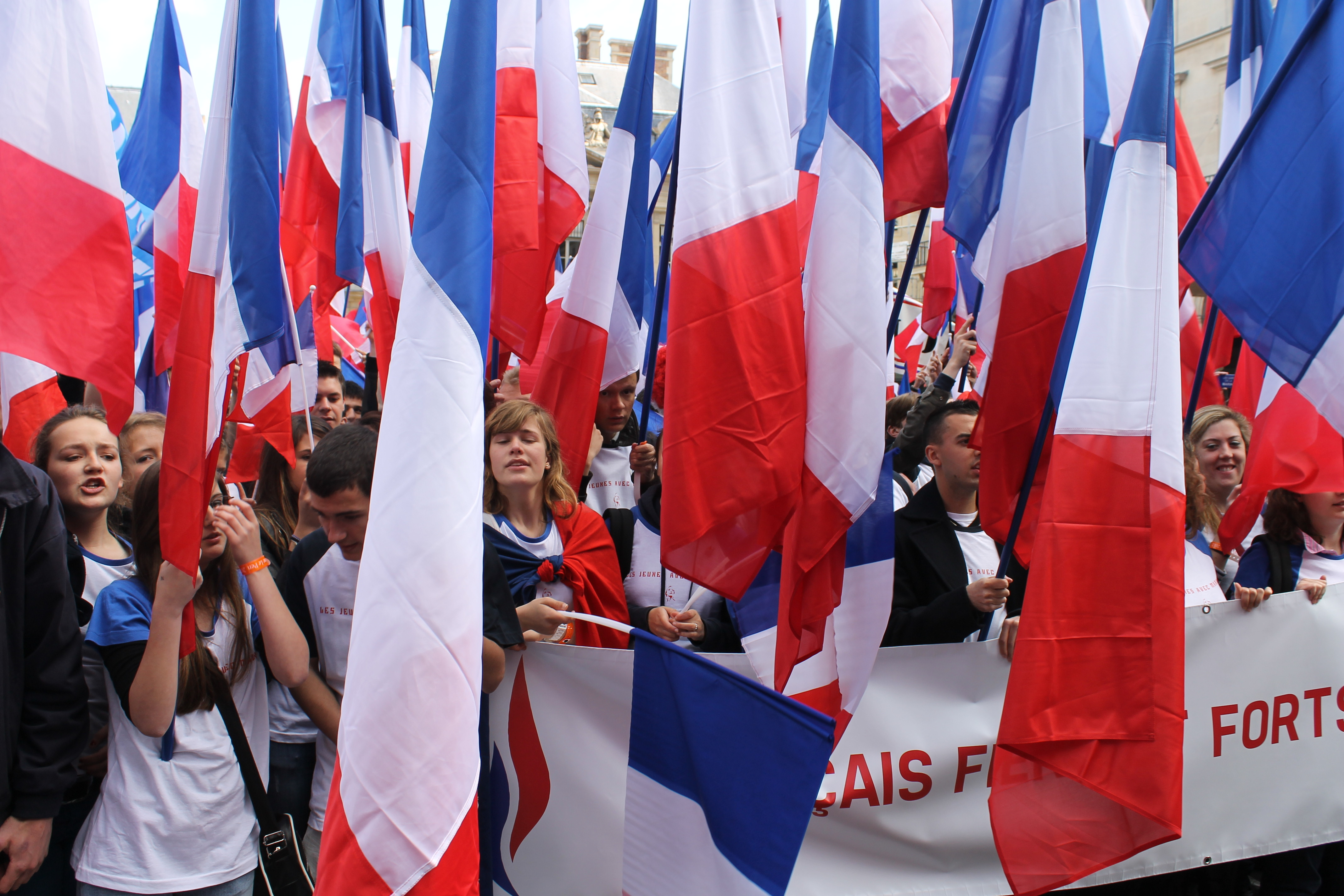 Cortège FNJ au sein du défilé du 1er-Mai organisé par le Front national à Paris, le 1er mai 2012. Photo : G. Bouchet/Front national